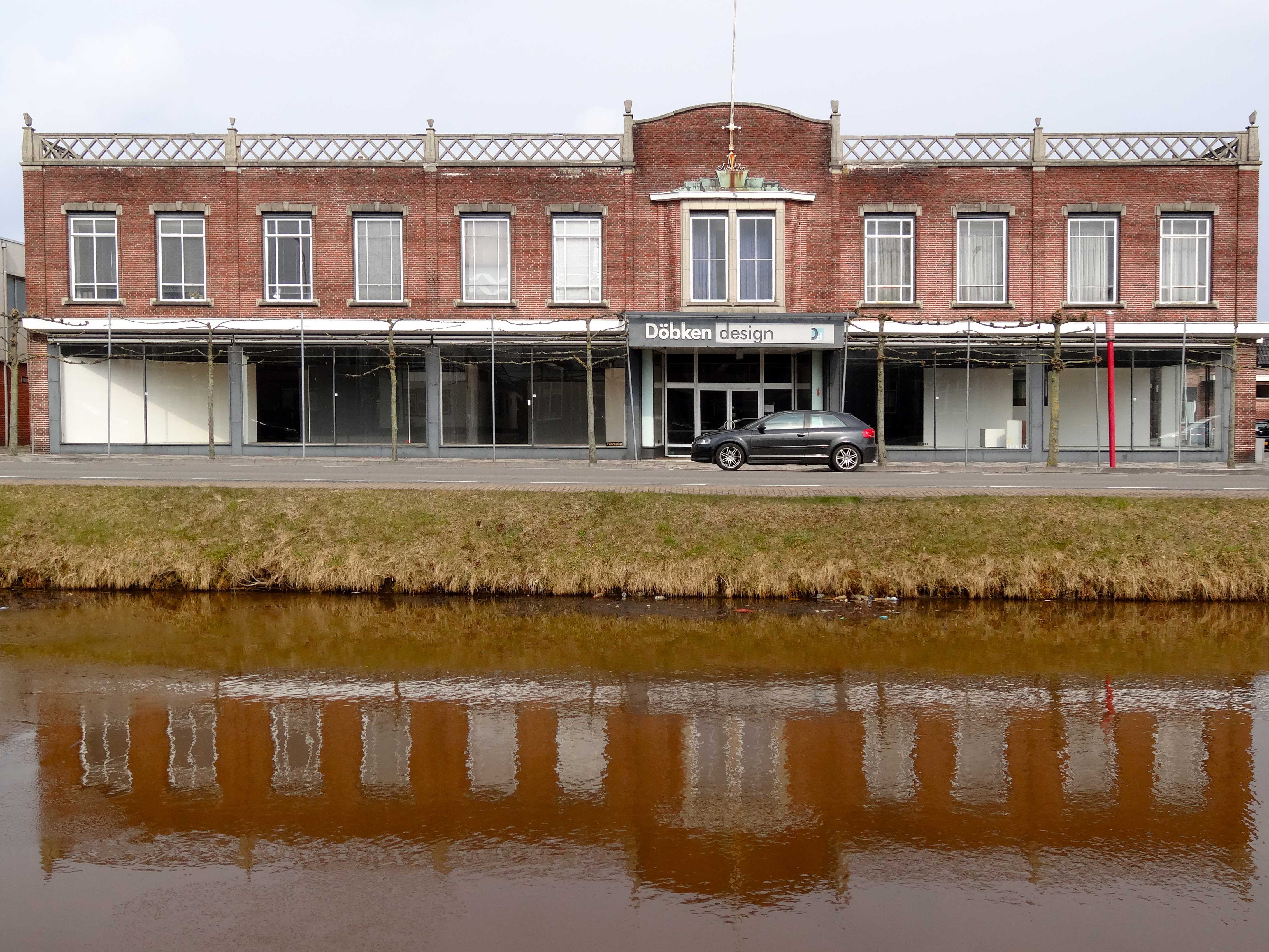 Handelsstraat 58 in Stadskanaal, gebouwd in opdracht van Grietinus Zwartsenberg, gemeentelijk monument